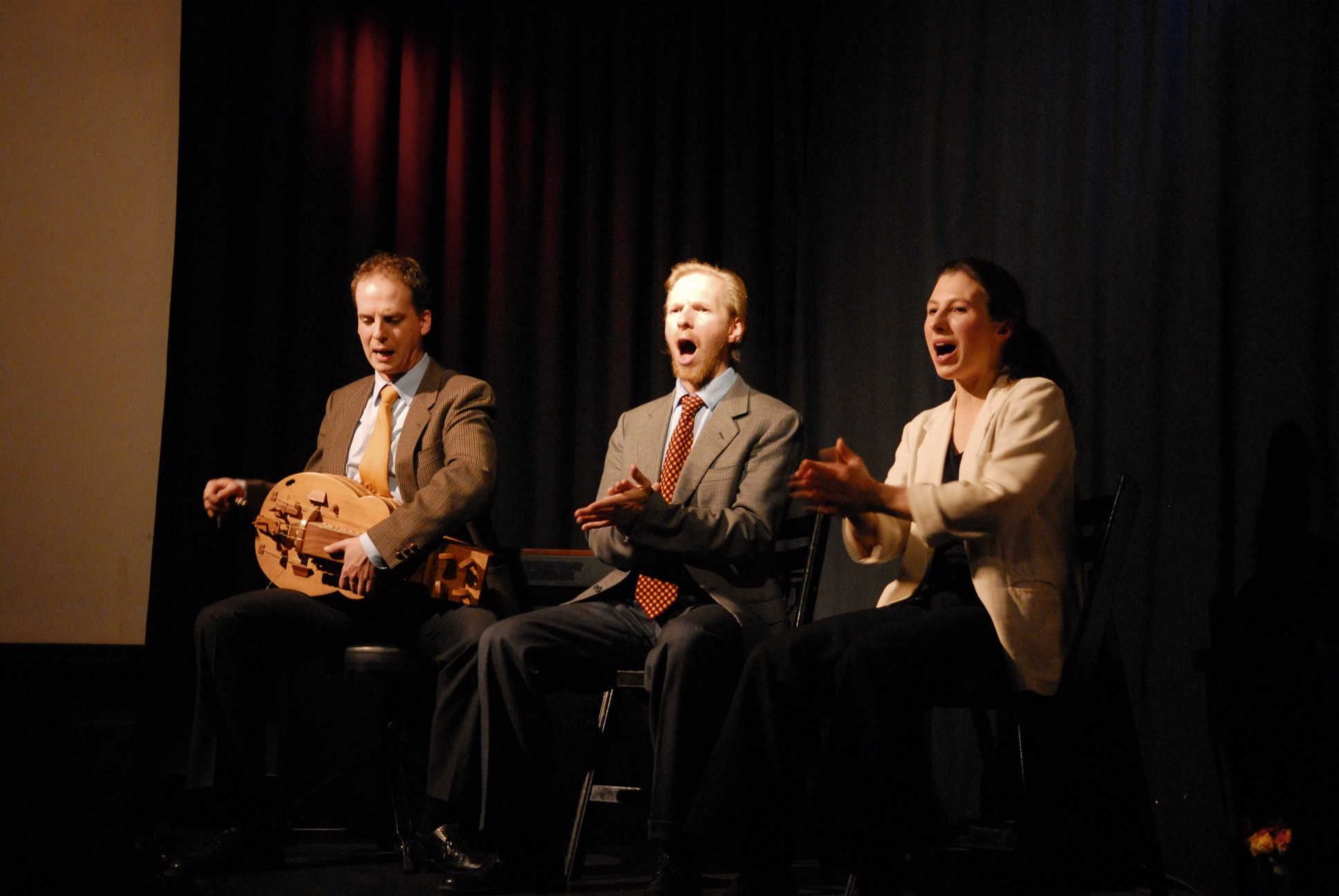 Die Gruppe "Riscant" bei einem Auftritt im "Schlachthof" München im Jahr 2010. V.l. Ramon Bessel, Sebastian Korp, Isabelle Scheiber (Es handelt sich noch um die alte Besetzung ohne Christoph Hirschauer)